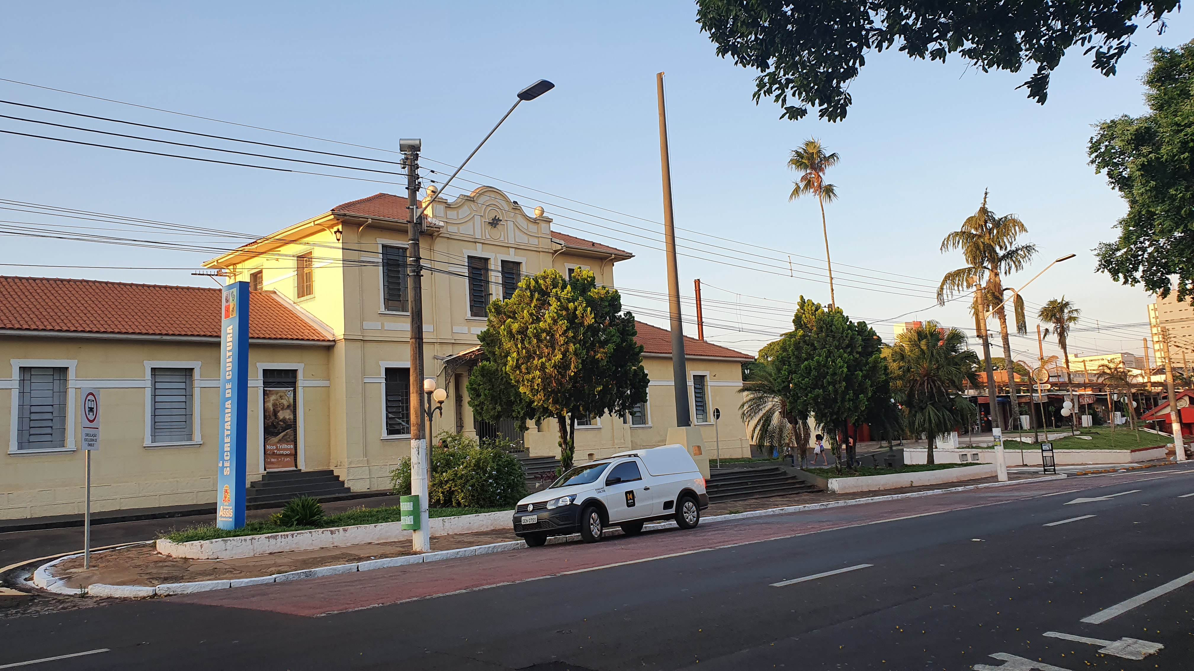 Estação Ferroviária de Assis - Estação Parada das Artes